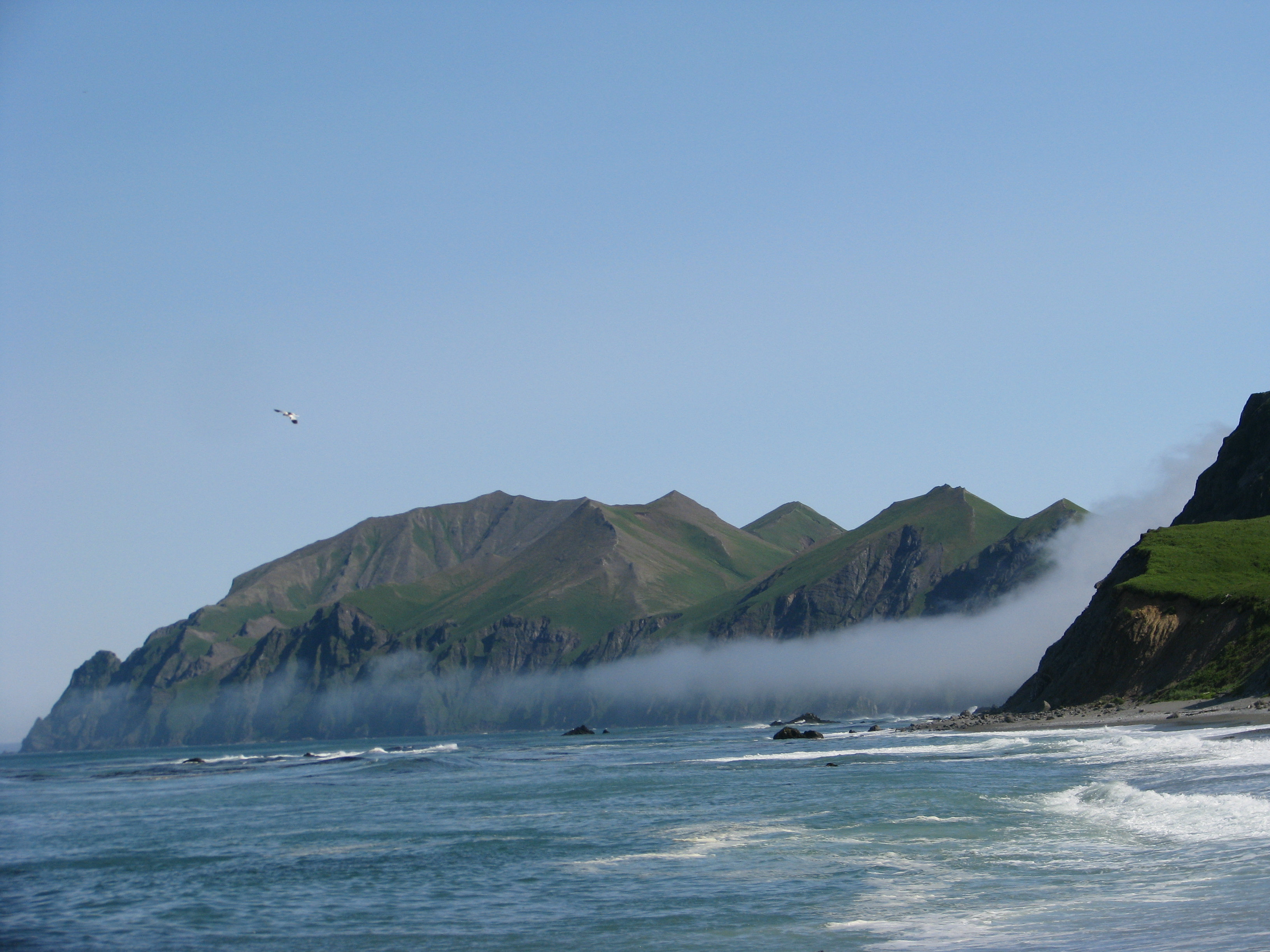 Командорский заповедник, Алеутский район This image is related to the protected area of Russia number 4100007